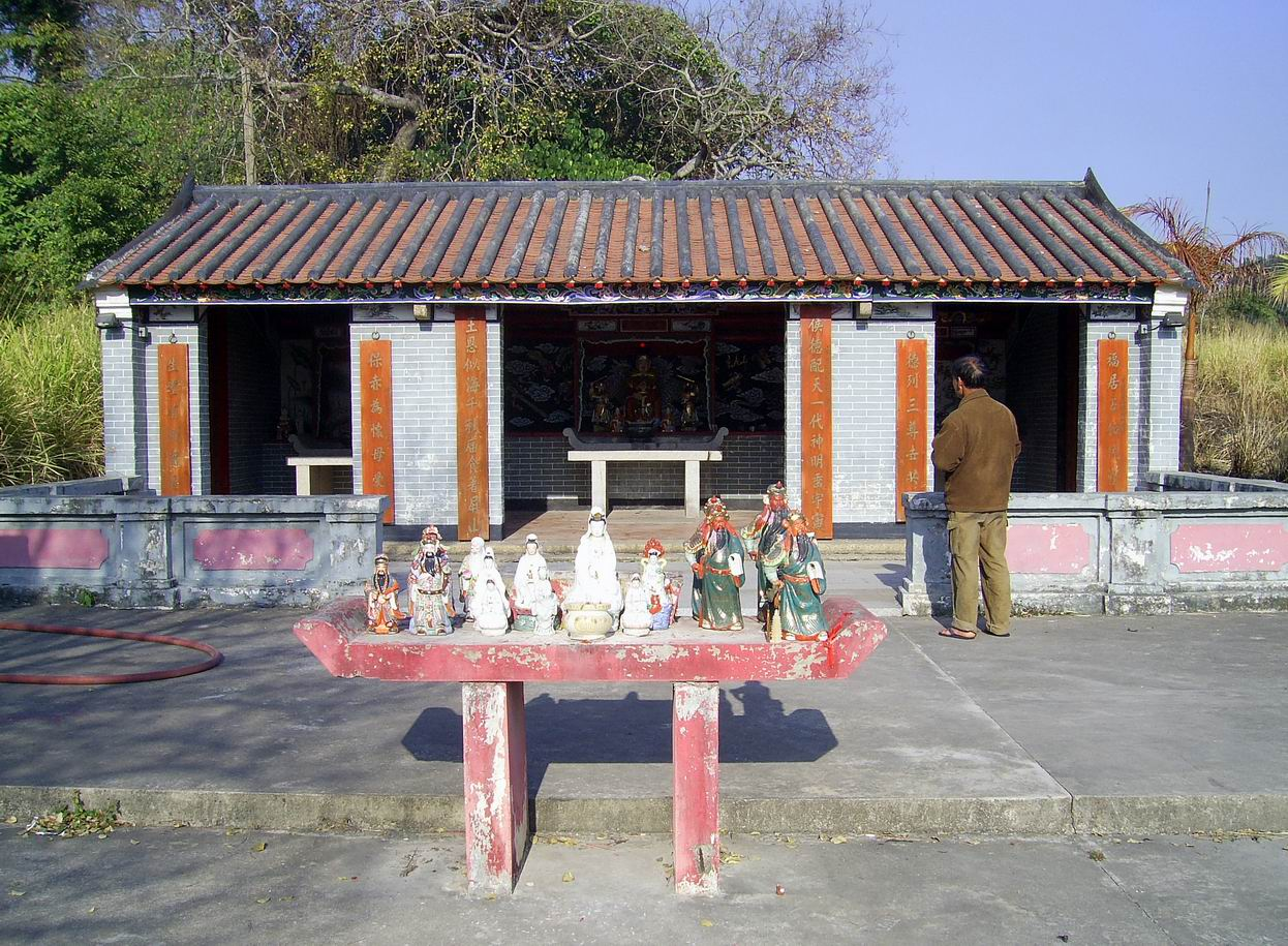 中文（香港）: 屏山楊侯古廟。